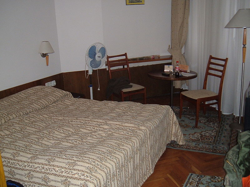 Room in hotel Kazakhstan